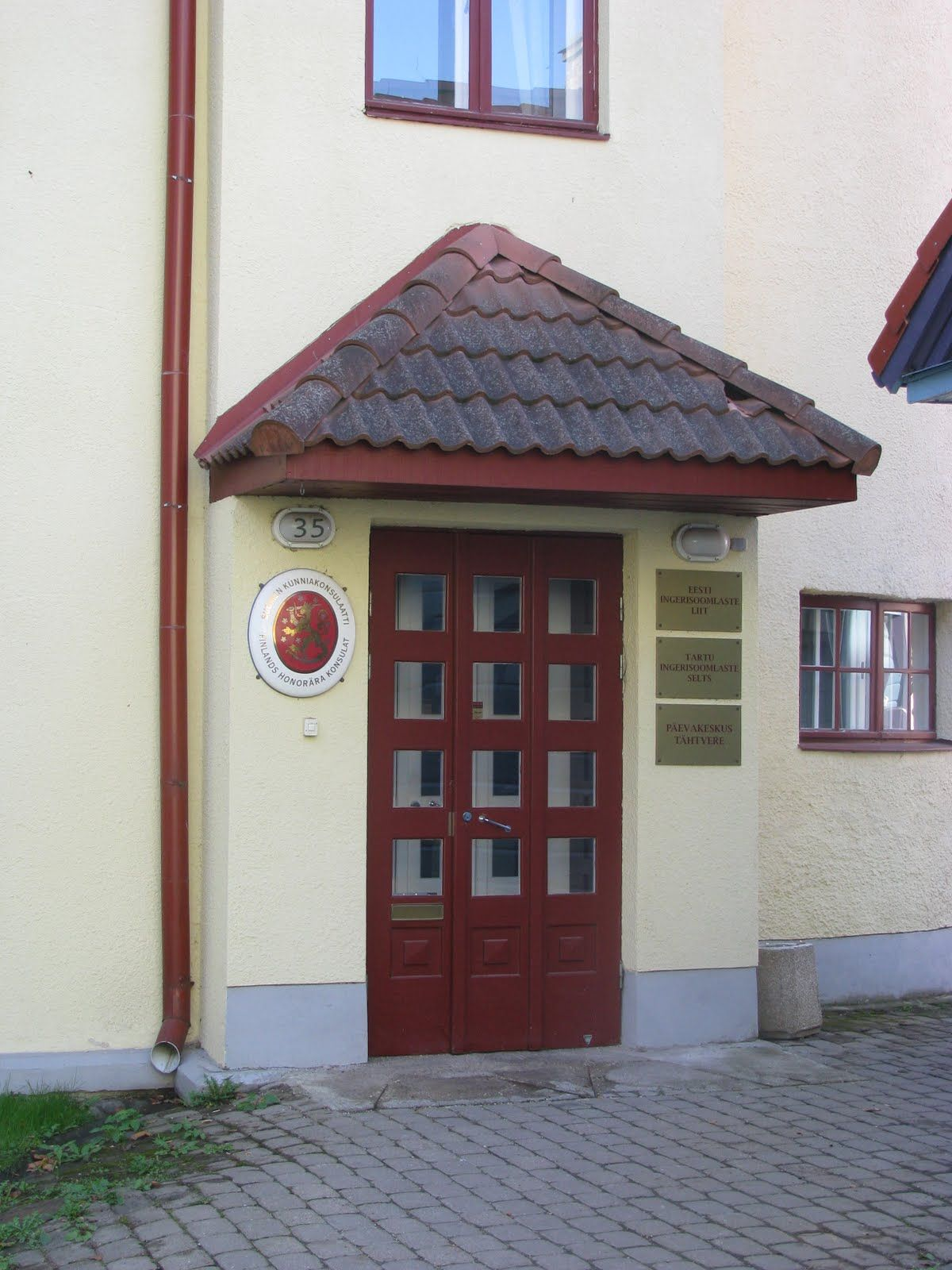 Elamu Tartus Veski 35, 1914.a. Soome aukonsulaadi, Eesti Ingerisoomlaste Liidu, Tartu ingerisoomlaste seltsi ja Tähtvere päevakeskuse ühine sissepääs, 30. september 2011.